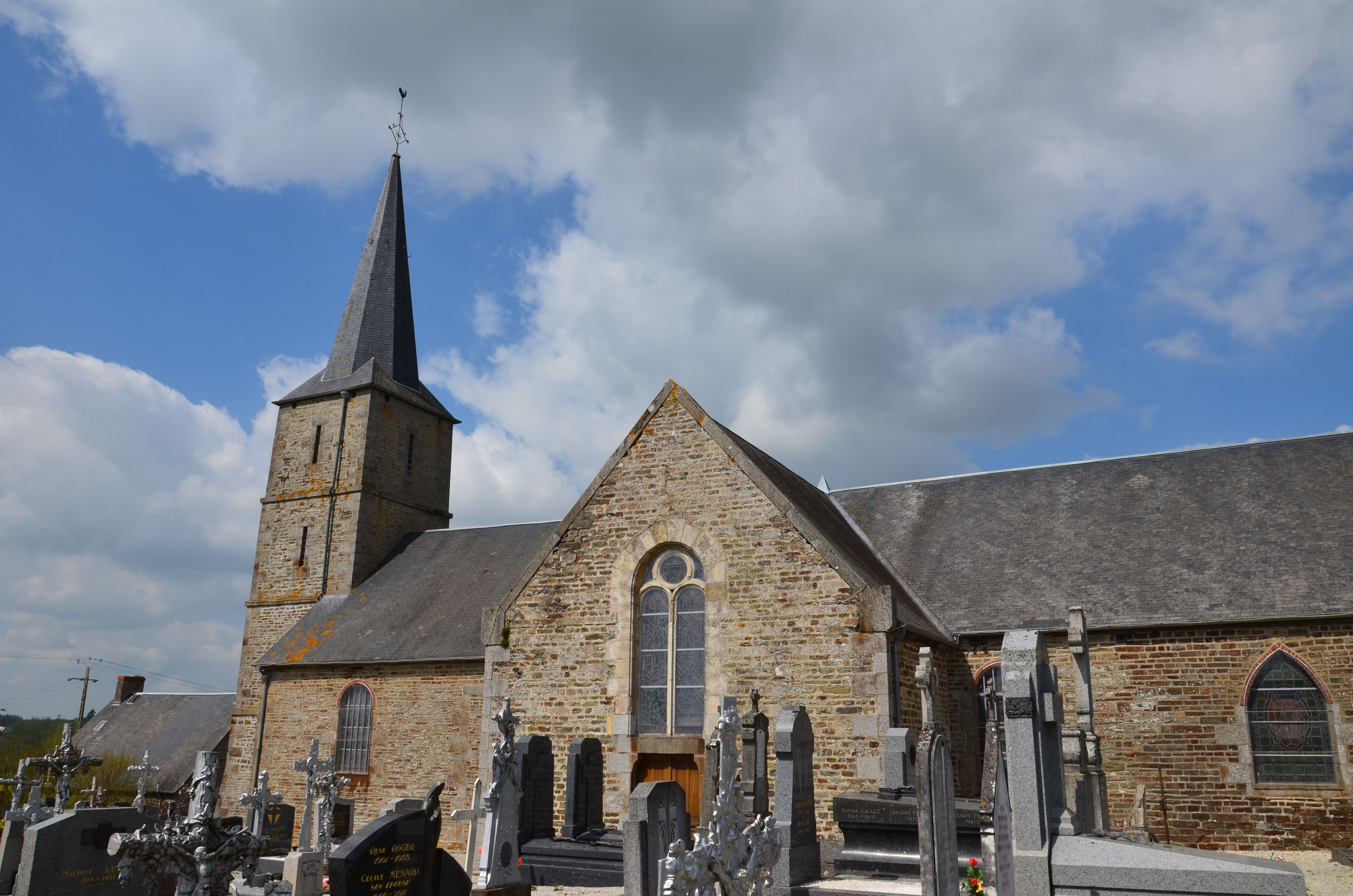 Église Saint-Martin de Rully.